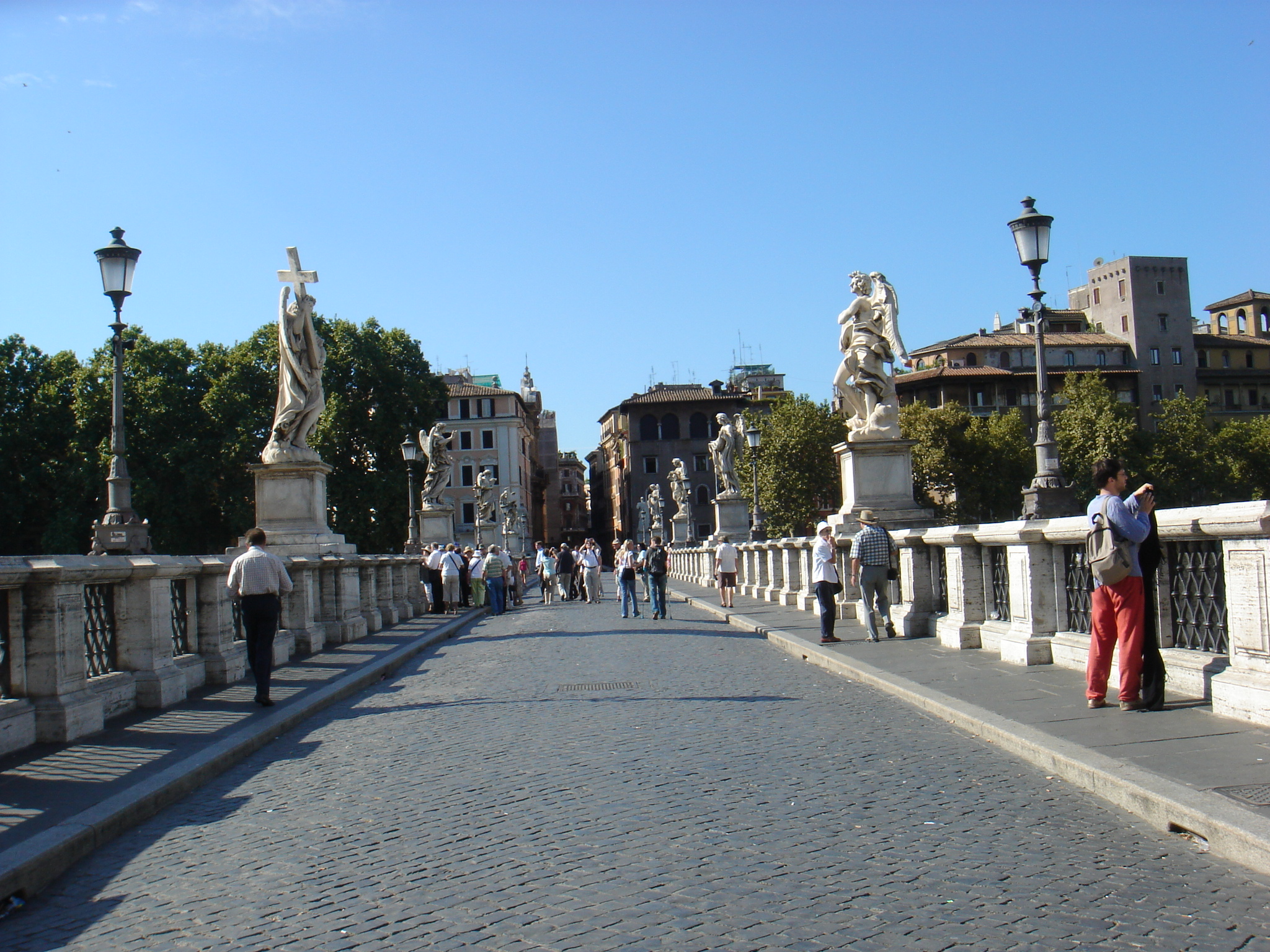 Roma, Ponte sant'Angelo verso la città